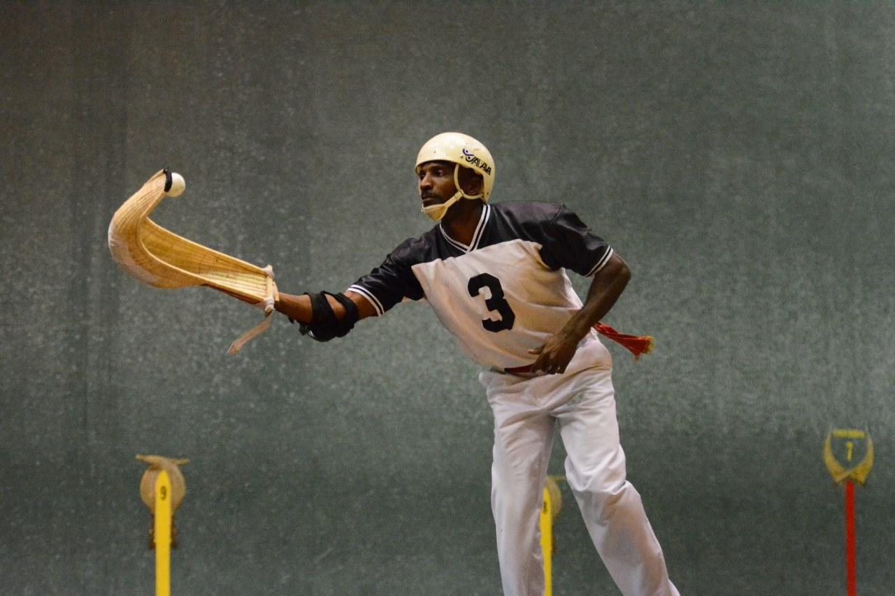 TEVIN pelotari estatubatuarra Miamiko frontoian.